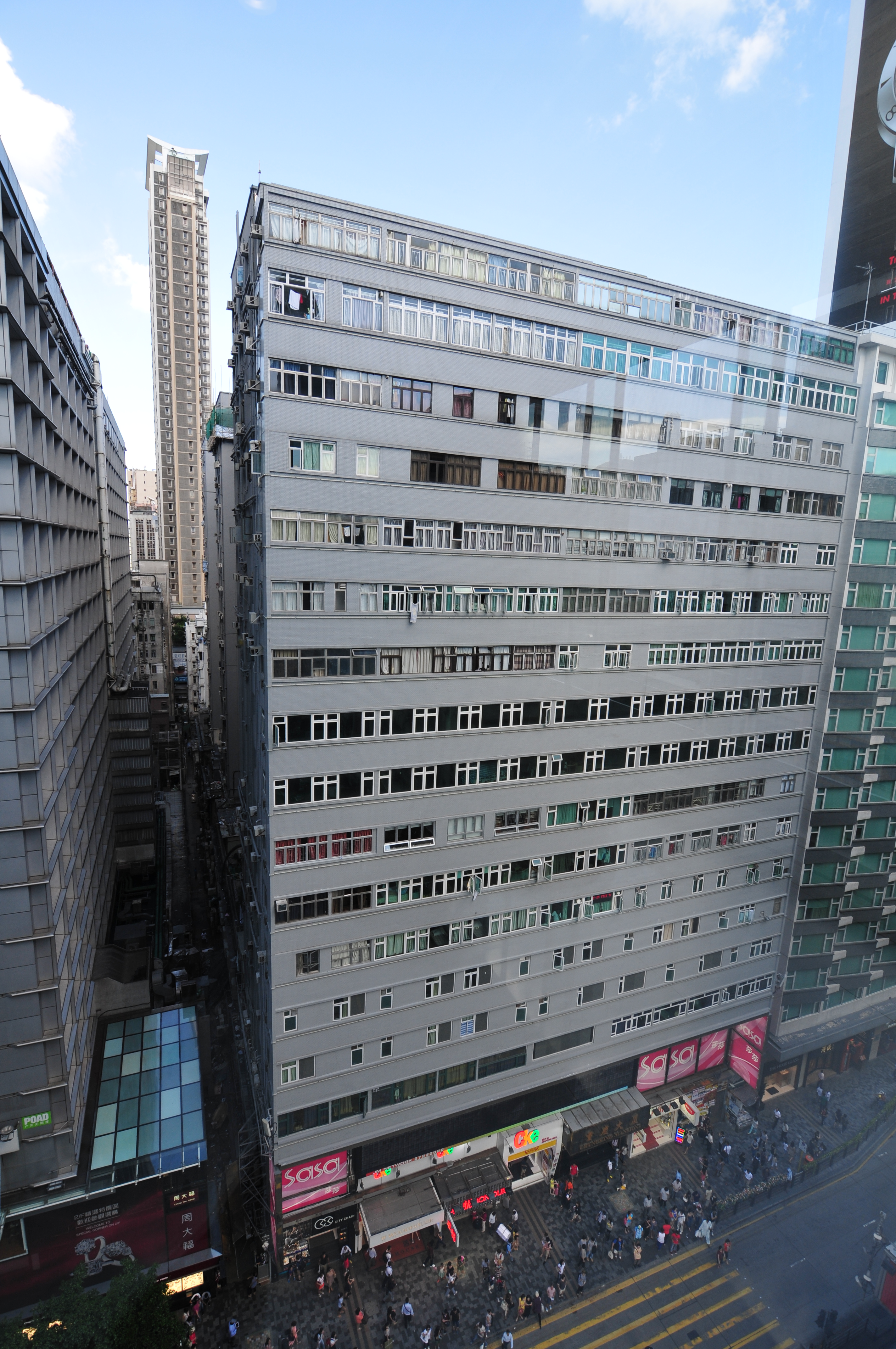 Wikimania 2013 Hongkong